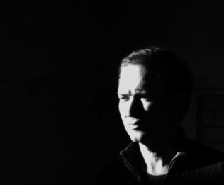 Felipe Hernández, enero 2010